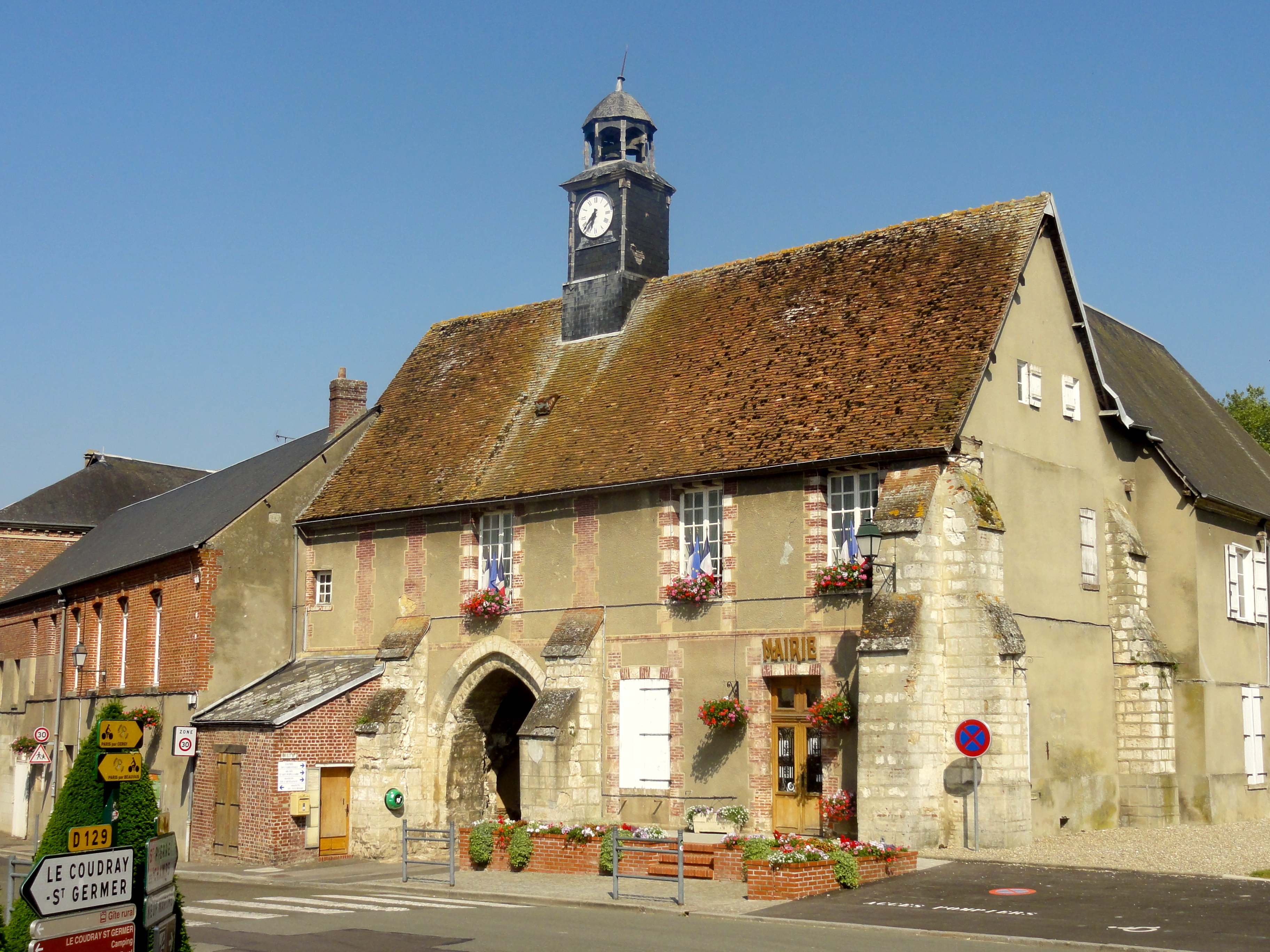 Bâtiment d'entrée de l'abbaye (porterie) avec grenier, puis école, aujourd'hui mairie.